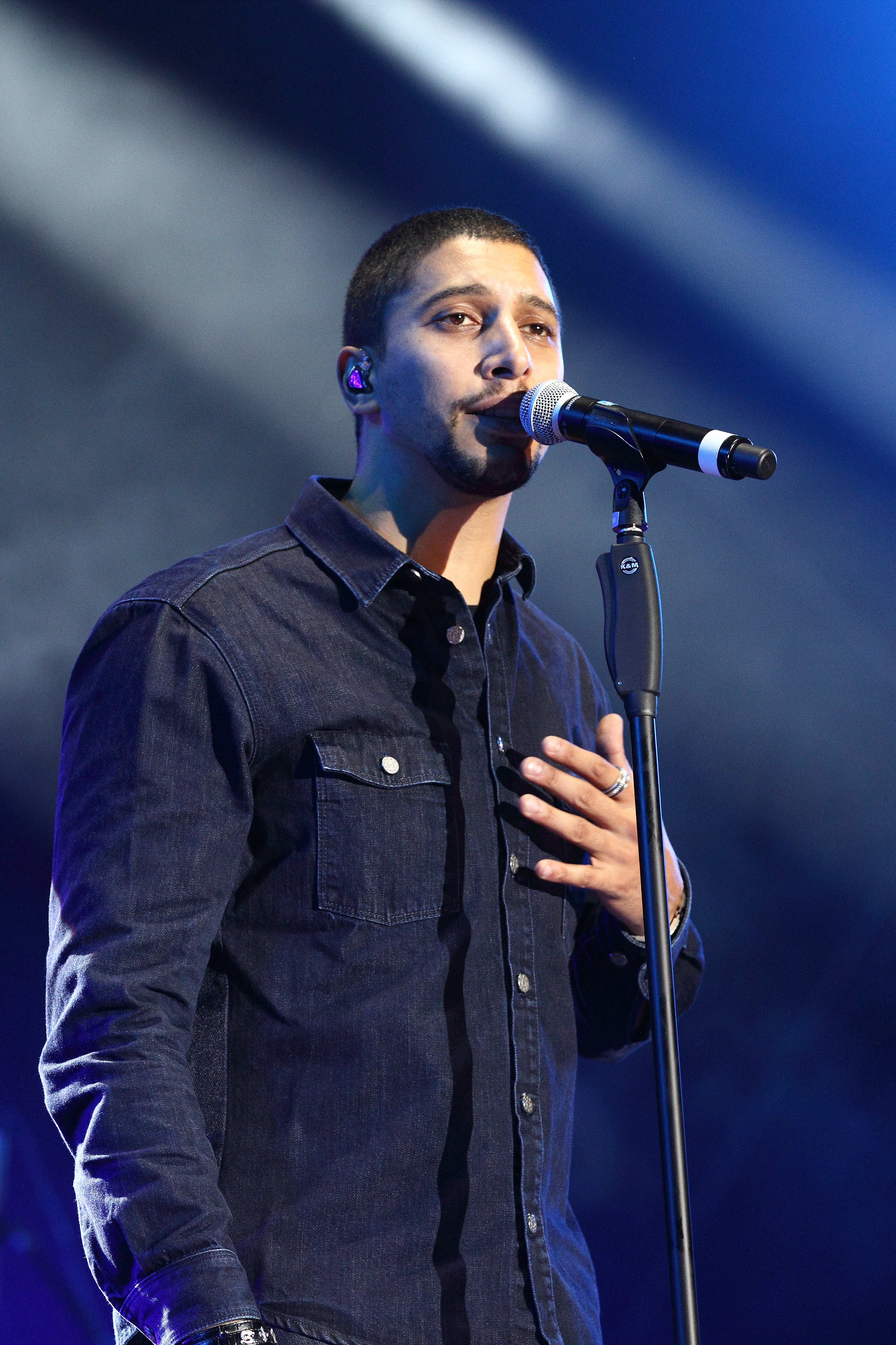 Andreas Bourani auf dem ENERGY IN THE PARK Festival 2014 Festivalsommer This photo was created with the support of donations to Wikimedia Österreich and Wikimedia Deutschland in the context of the CPB project "Festival Summer". For taking this photo and licensing it under a free licence a (press) accreditation was required. The photographer had a valid accreditation and has sent it to the email response team, it has been archived in the OTRS system. Users with OTRS account can access it here. Please be aware that (press) accreditations are a permission to generally take photos only and do not make any statement about the copyright status of this photo! Link to the ticket: Personality rights warningAlthough this work is freely licensed or in the public domain, the person(s) shown may have rights that legally restrict certain re-uses unless those depicted consent to such uses. In these cases, a model release or other evidence of consent could protect you from infringement claims.